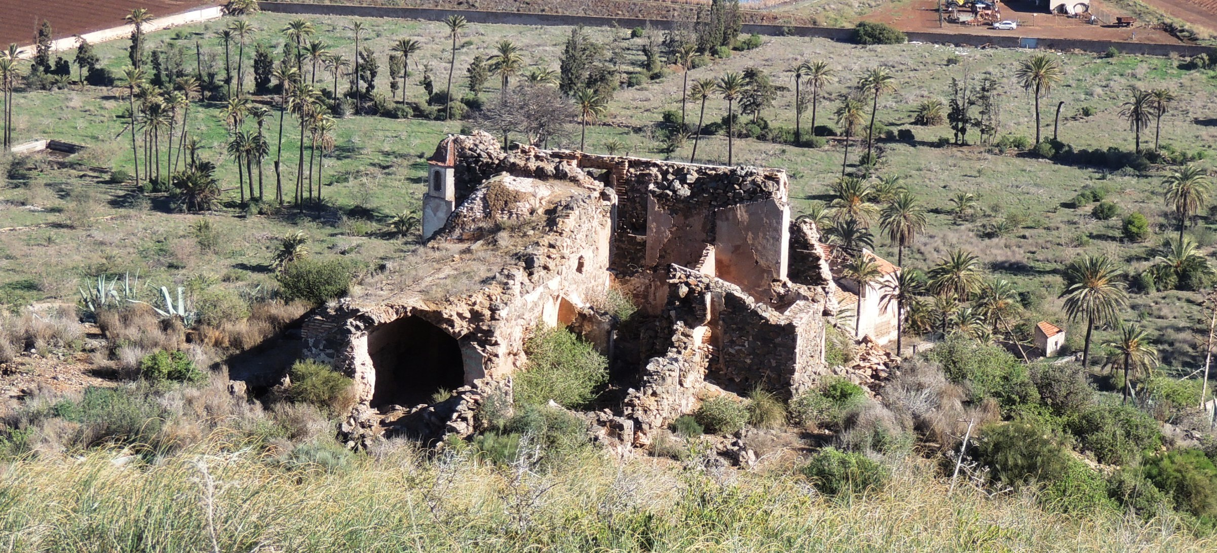 Ermita de Los Angeles, lugar de penitencia de San Ginés de la Jara